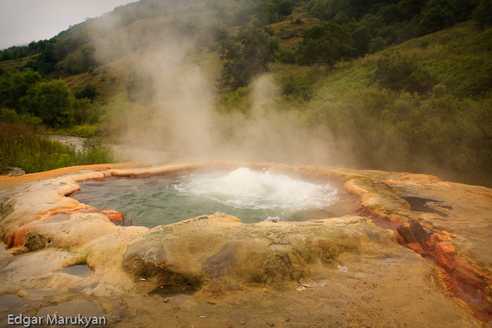 Ջերմաջուրի բնական տաք աղբյուր